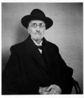 Porträtfoto des Artzes Emil Ludwig Schmidt